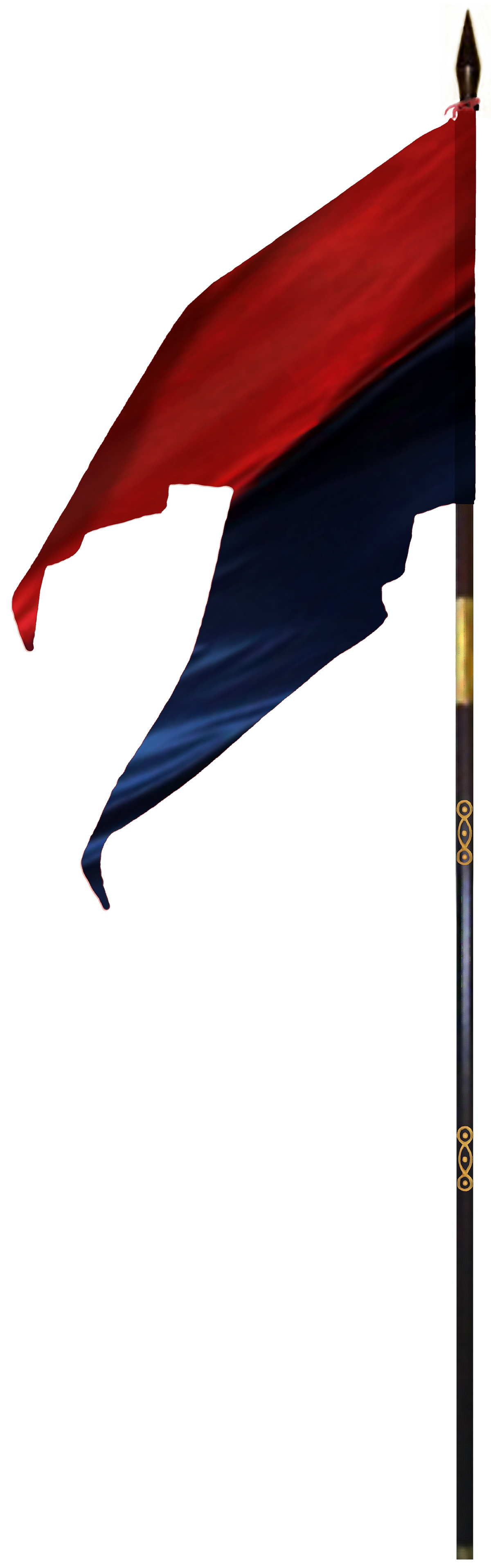 Опис слике: Ратна застава Немањића (са краћим крацима) из времена Стефана IV Владислава Немањића (1198-1267), краља Србије (владао: 1234-1243).